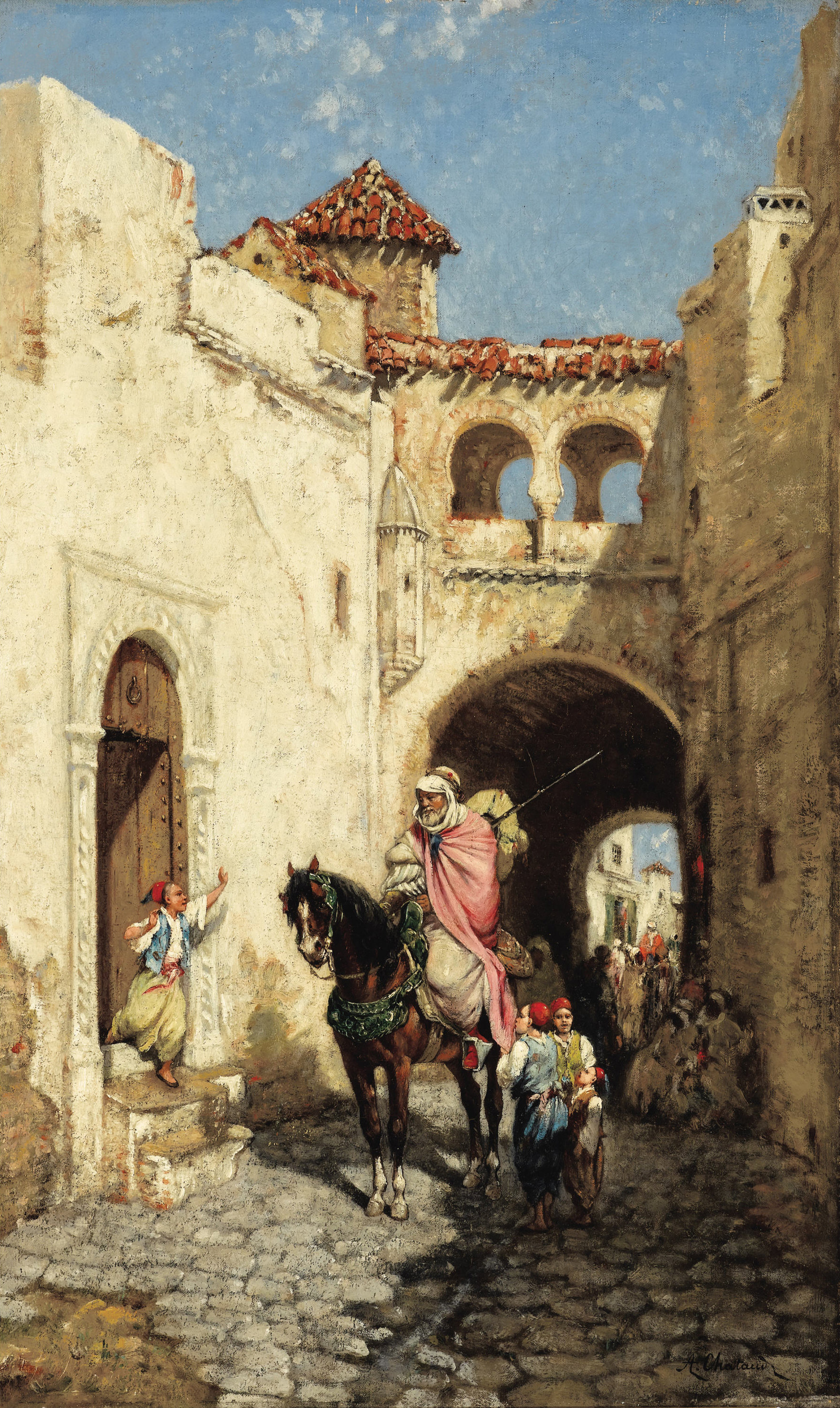 Scène de rue